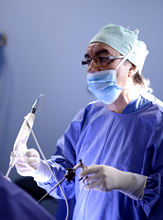 Doctor Carbajo.